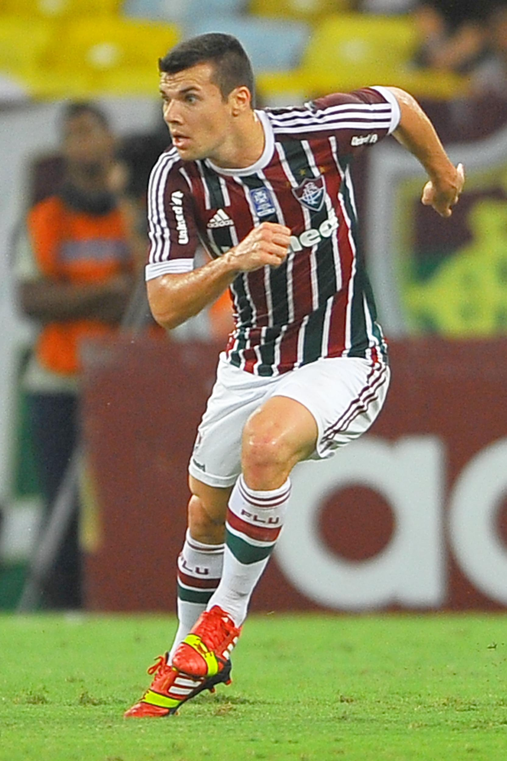 02 outubro 2013 jogo Fluminense 1x1 Botafogo, realizado no Maracanã